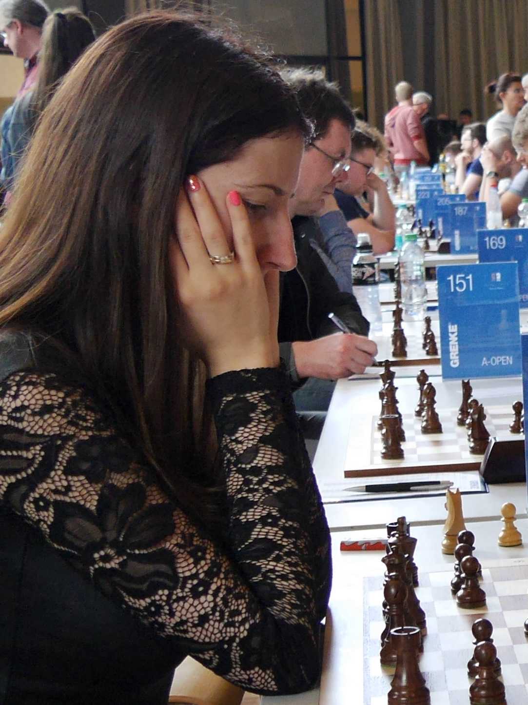 Iva Videnova, Grenke Chess Open 2018 in Karlsruhe.